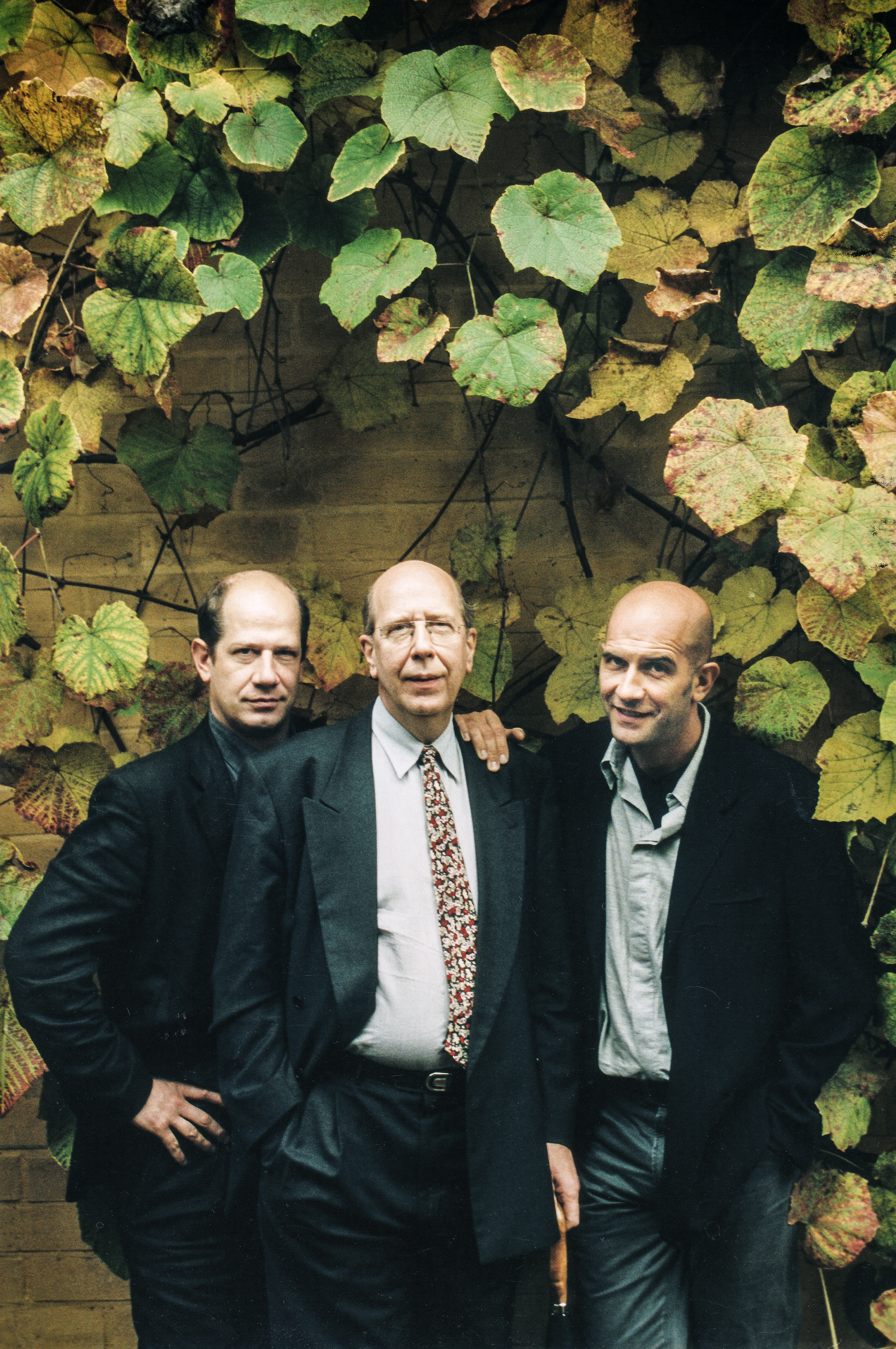 Herman Balthazar, Vlaams historicus, hoogleraar aan de Universiteit Gent en oud-gouverneur van de provincie Oost-Vlaanderen. Met zonen Tom (L) en Nick (1995).